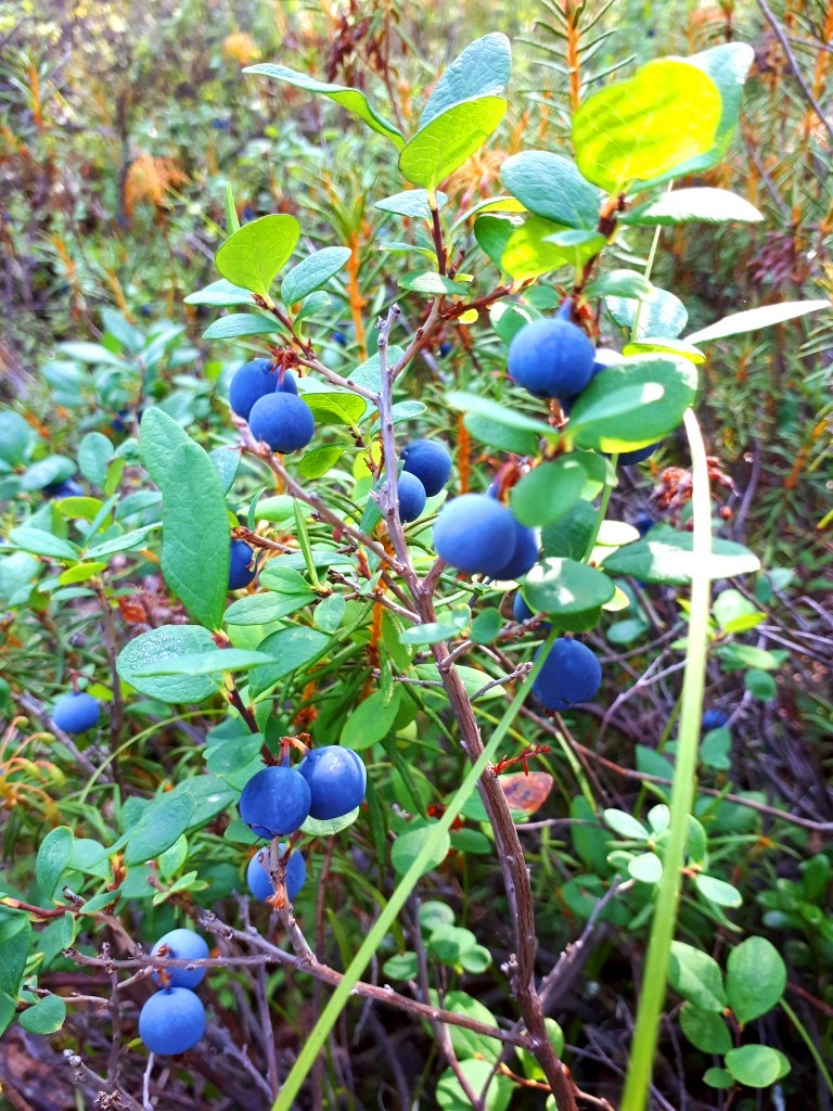 Blueberries on the branches of a bush